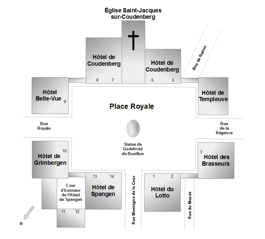 Belgique - Bruxelles - Plan de la place Royale